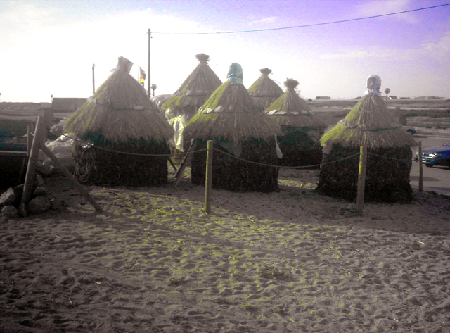 Medas de Sargaços /Santo André - Aver-o-Mar